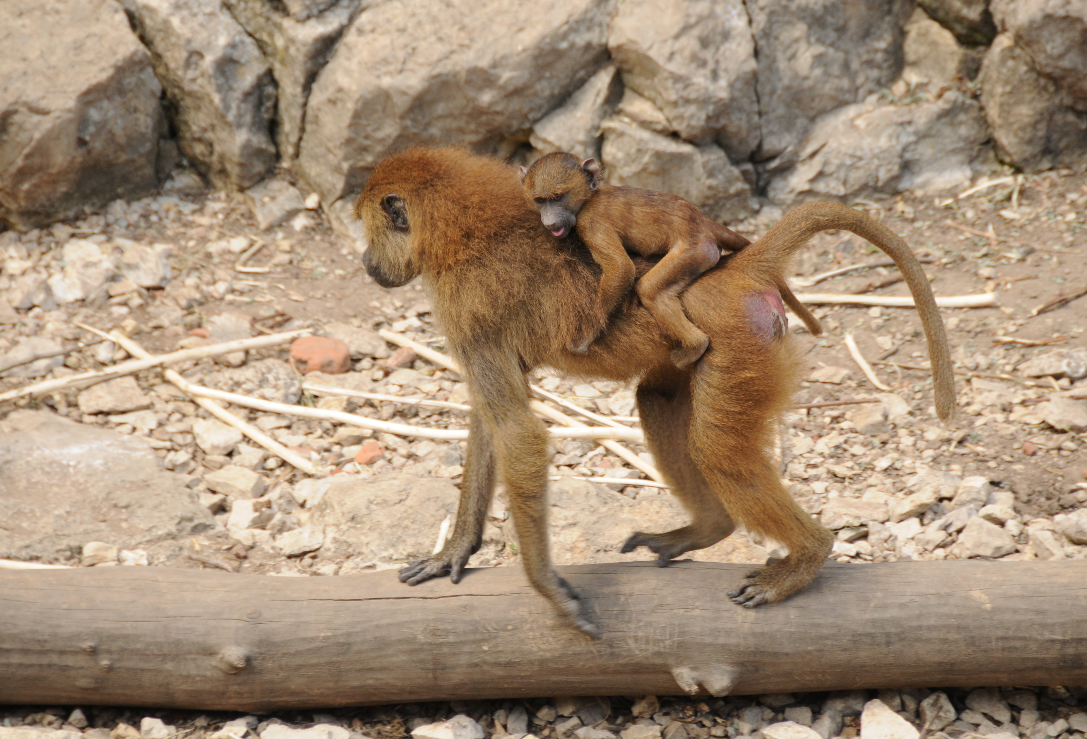 This photograph was taken with a Nikon D300 Citadelle de Besançon : Babouin de Guinée (Papio papio) (zoo de la citadelle).